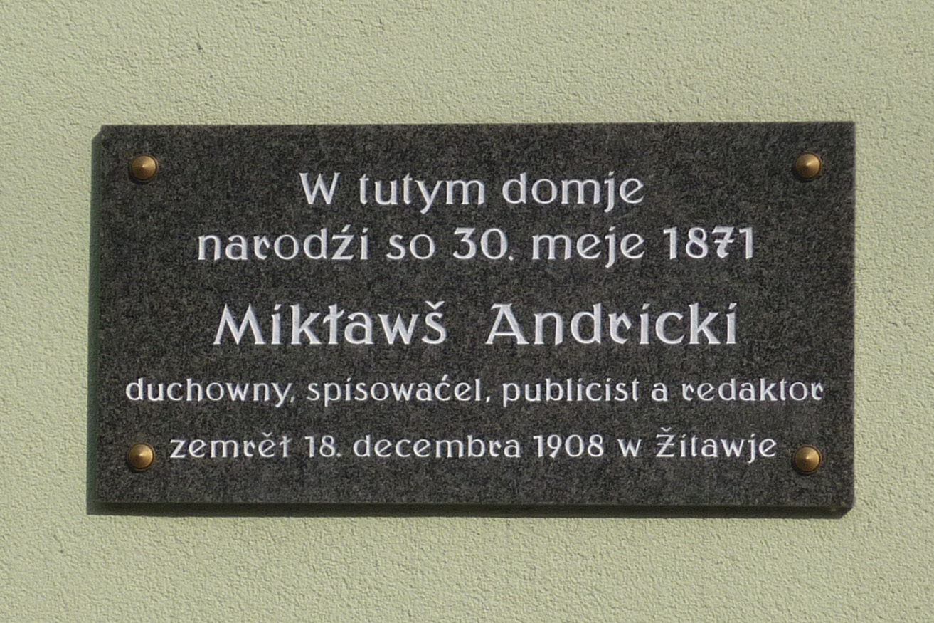 Tafel am Geburtshaus von Mikławš Andricki (1871–1908), sorbischer Schriftsteller, in Panschwitz-Kuckau, An der Hohle Hornjoserbsce: Wopomnjenska taflička při ródnym domje Mikławša Andrickeho w Pančicach.